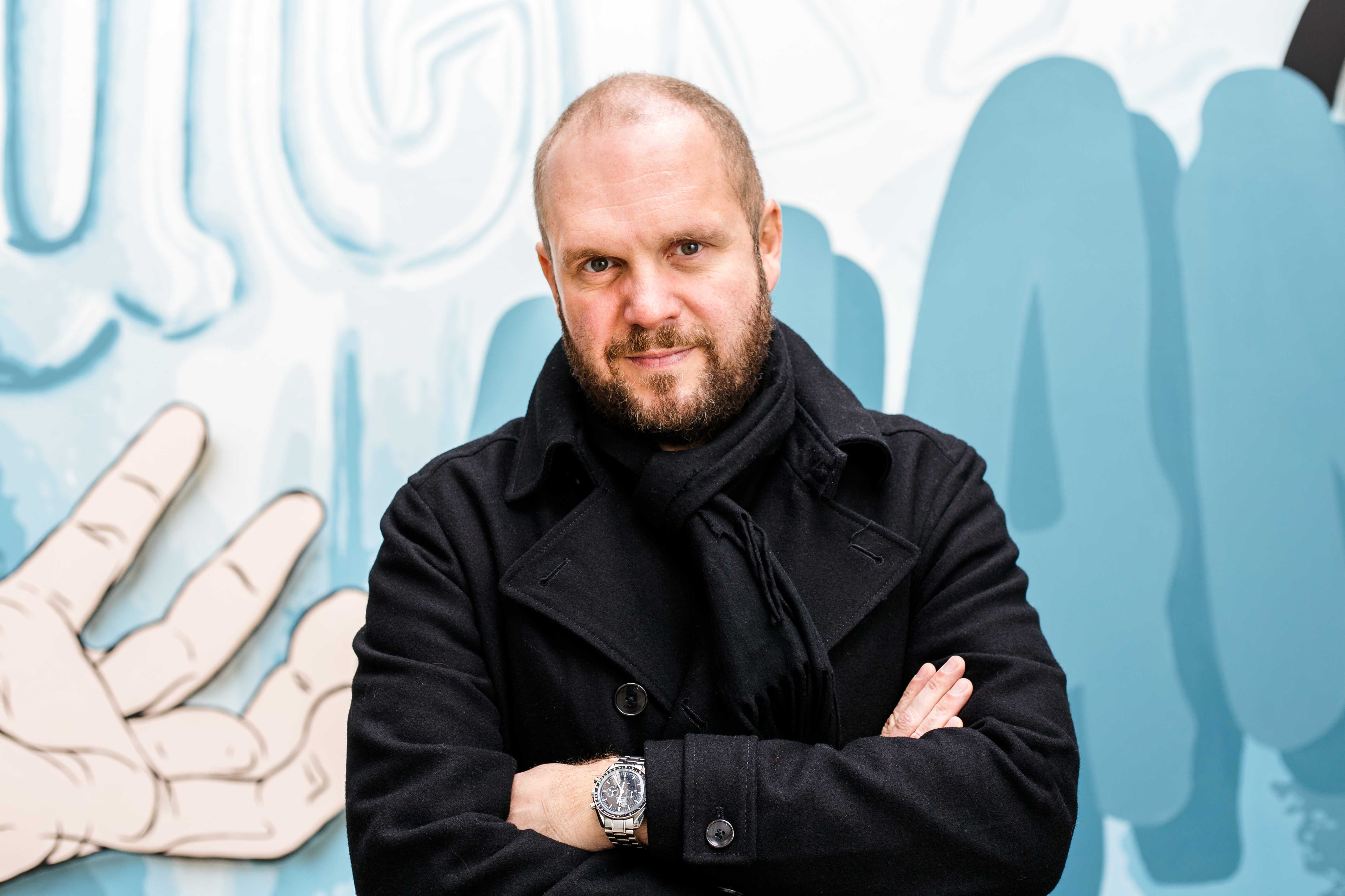 David Ondříček